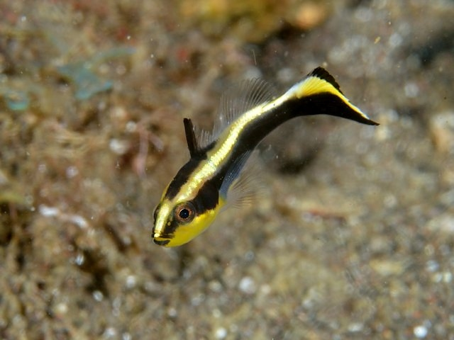 コロダイ Diagramma picta